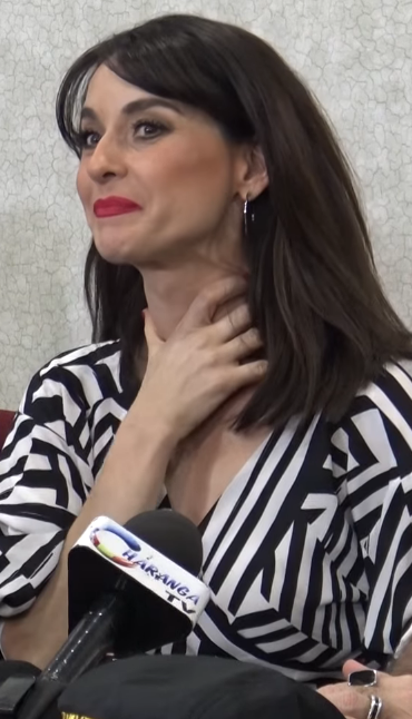 ¿Carmen Salinas es amiga de los papás de Donald Trump? regañan a Edith González x enseñar calzones